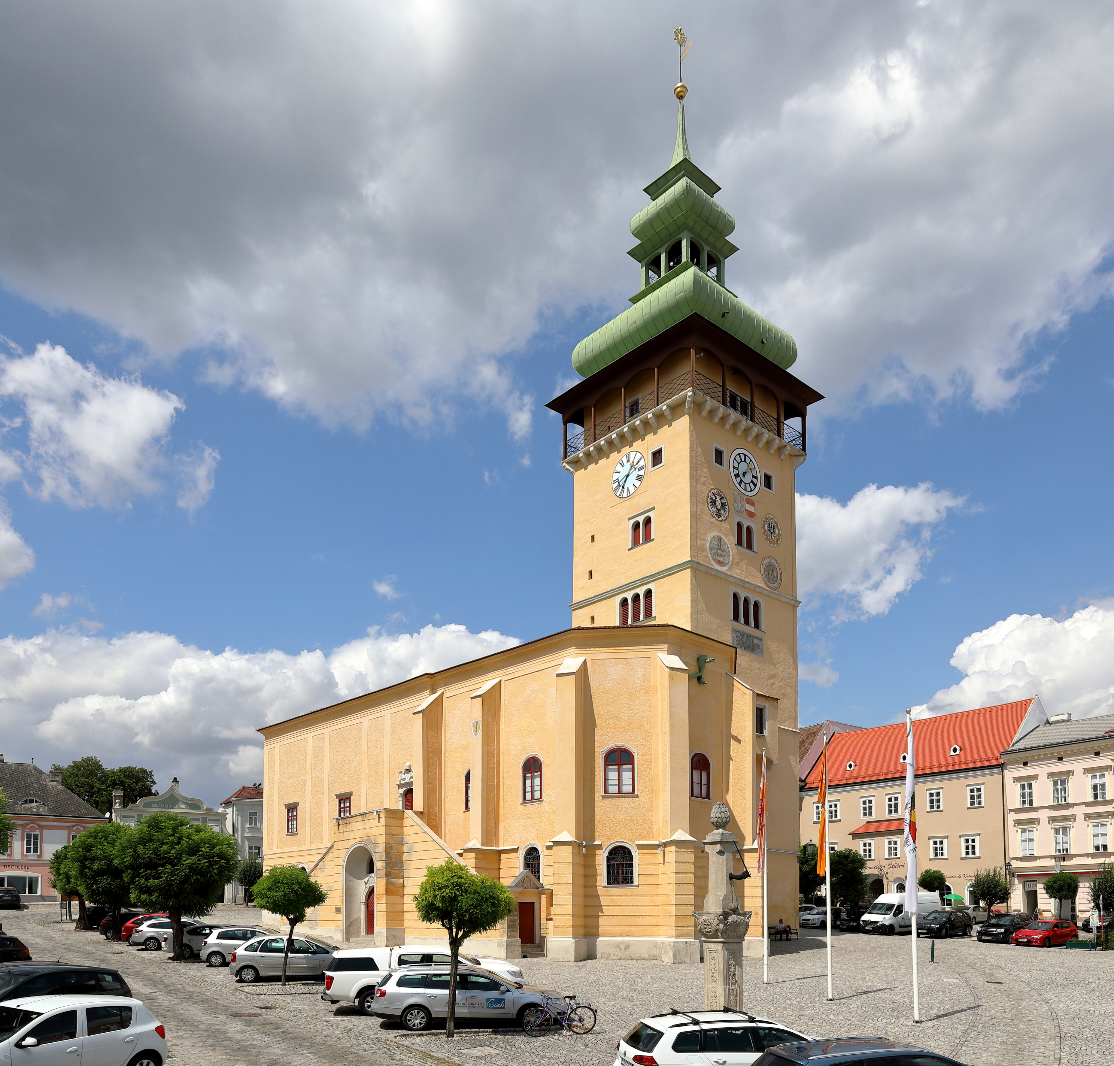 Das ehemalige Rathaus mit Rathausturm am Hauptplatz in der niederösterreichischen Stadtgemeinde Retz. Ursprünglich als gotische Kirche gebaut, blieb sie unvollendet und wurde Mitte des 16. Jahrhunderts zu einem Rathaus mit Rathausturm umgebaut.